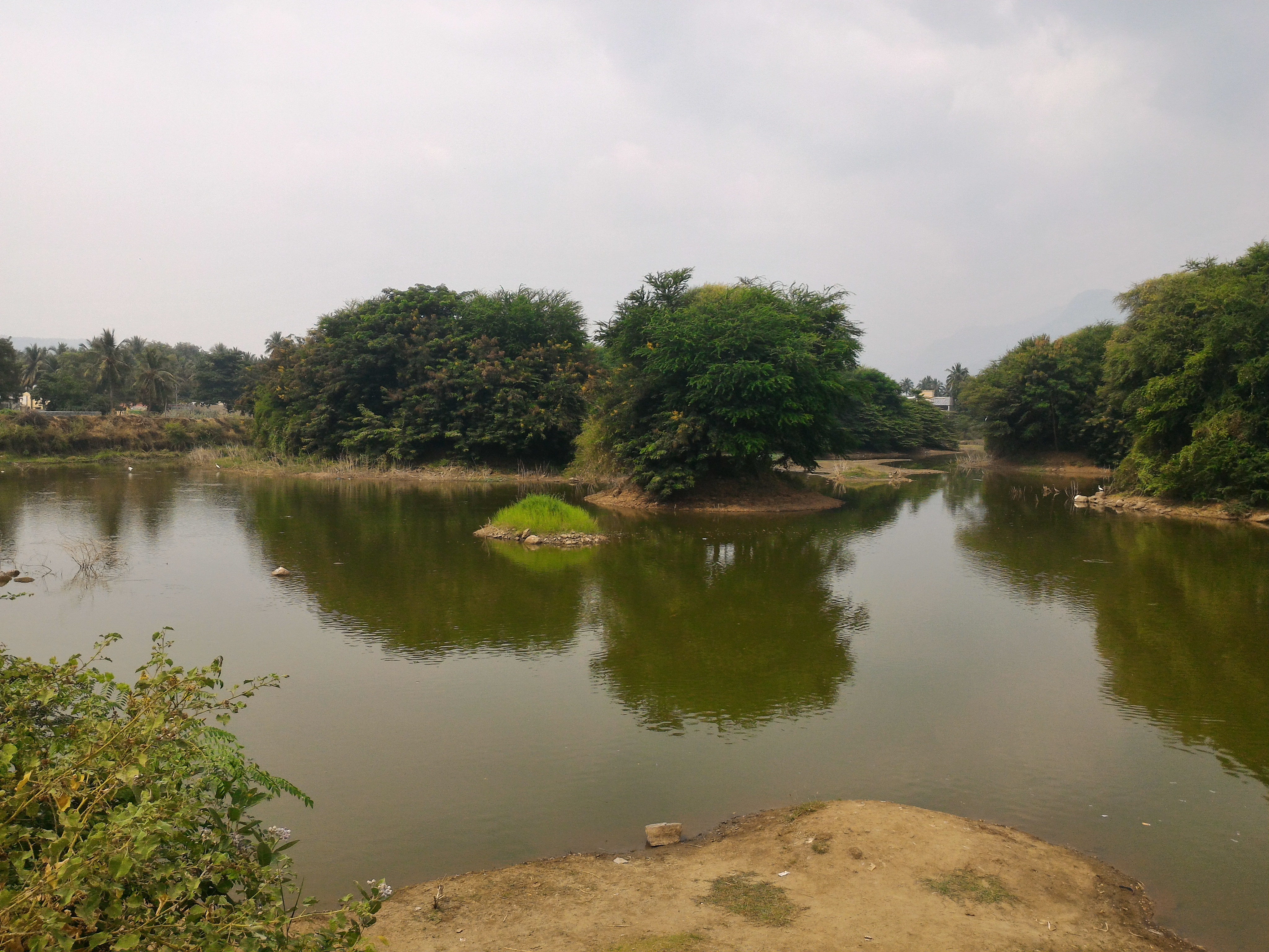 Taken in Asus Zenfone 2